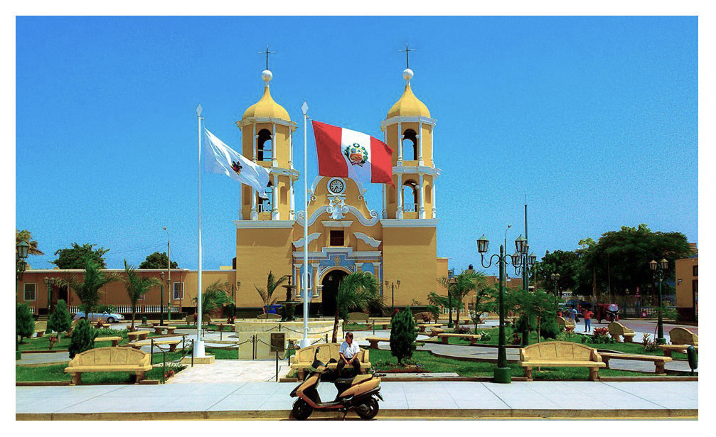 Catedral SAN PEDRO DE LLOC Google Maps